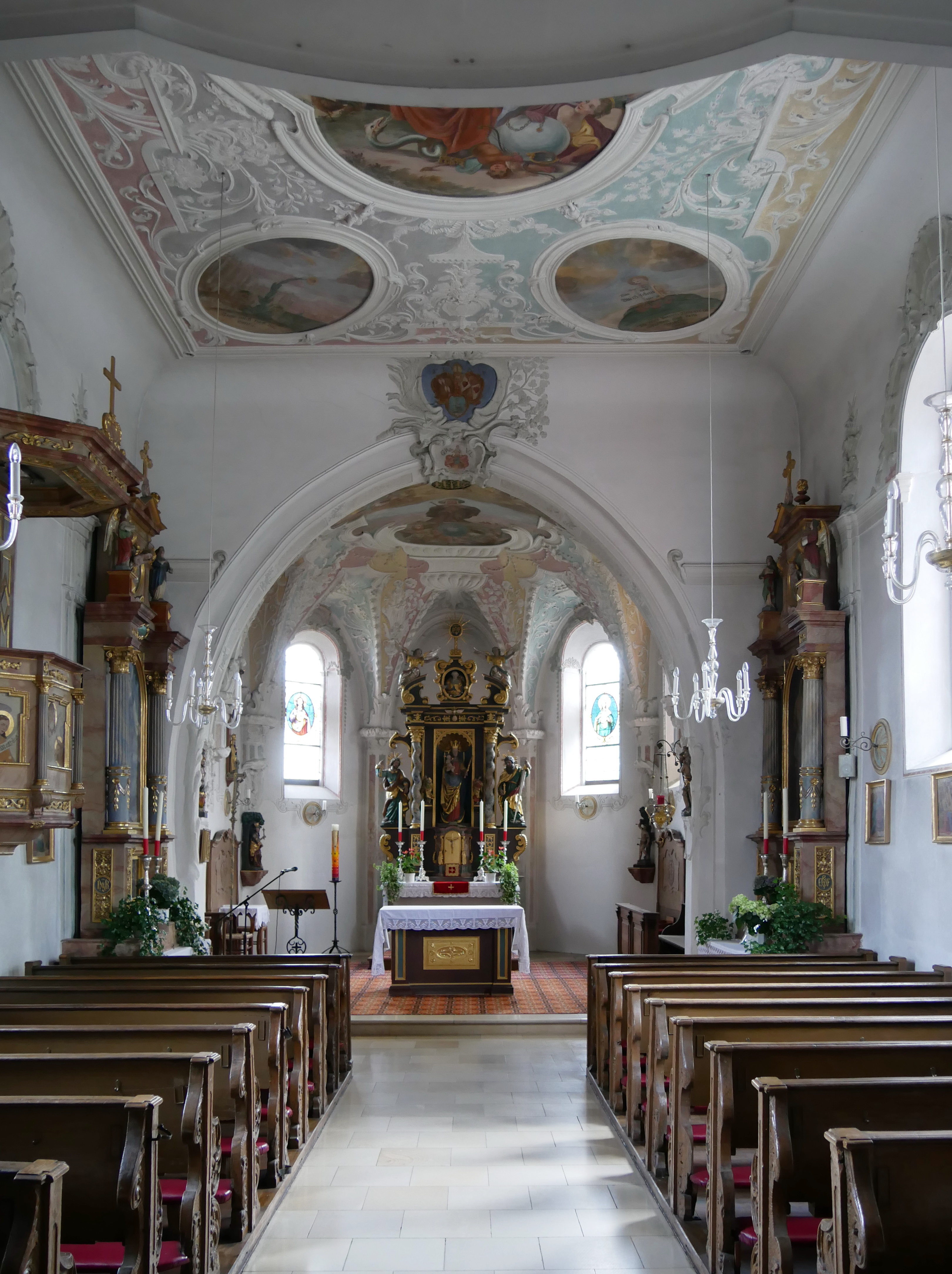 Katholische Filialkirche St. Sebastian. Innenansicht in Richtung Altar